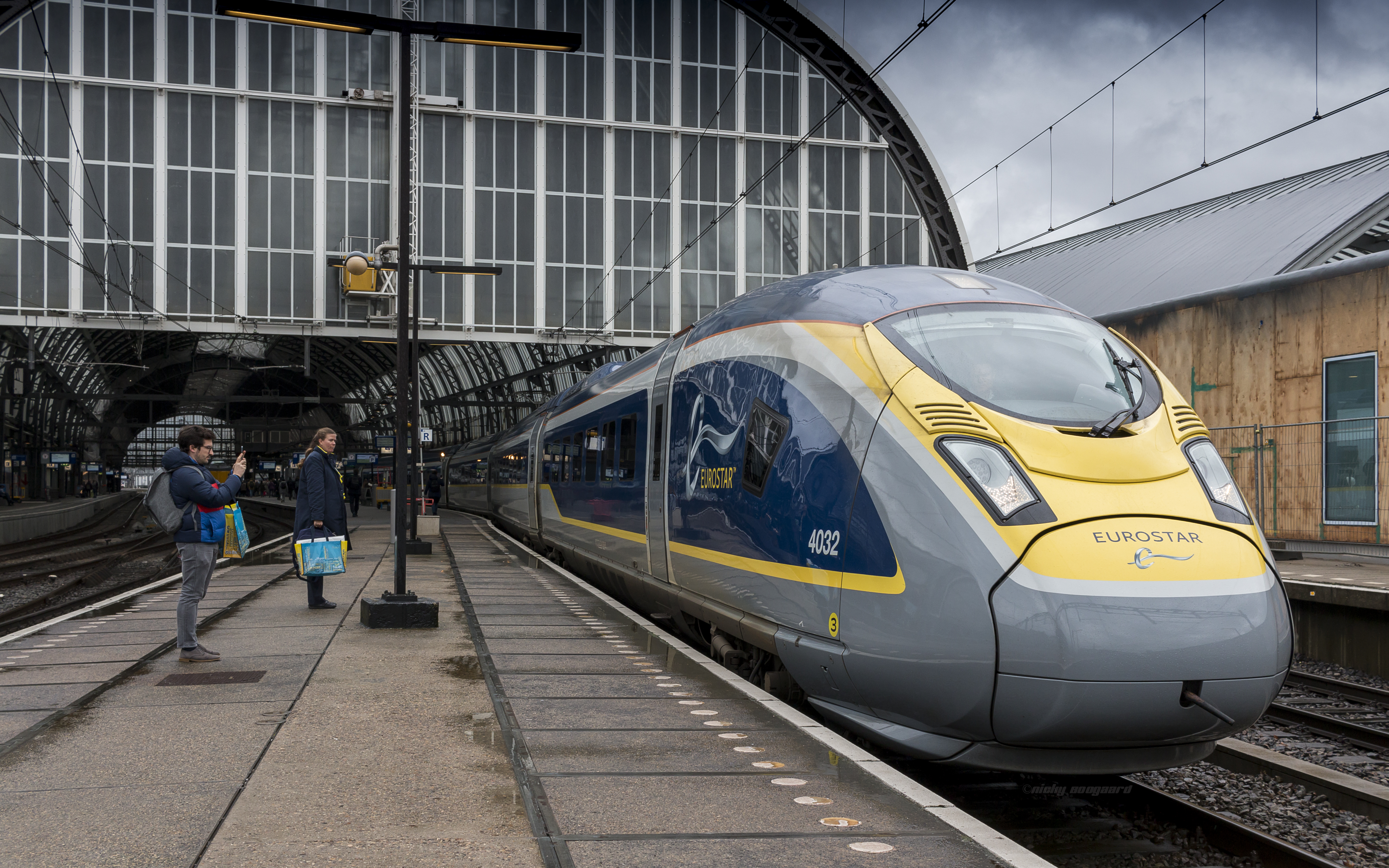 Amsterdam, the Netherlands